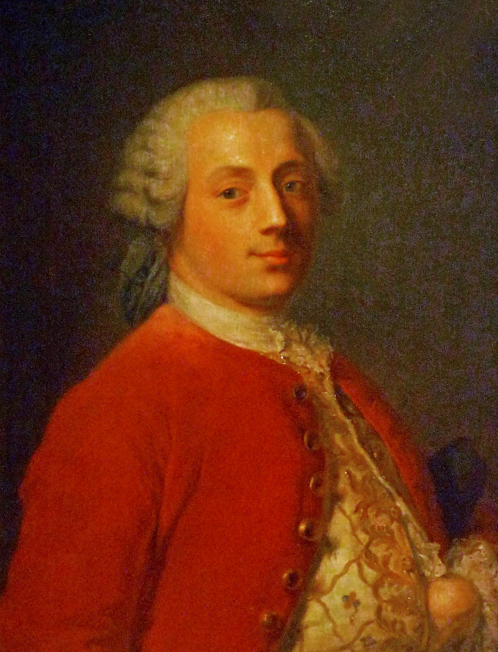 Musée d'impression sur étoffes de Mulhouse : portrait anonyme (19e siècle) de Jean-Henri Dollfus, l'un des quatre fondateurs de la première fabrique d'impression d'étoffes de coton (indiennes) à Mulhouse, en 1746. Les trois autres sont Jean-Jacques Schmaltzer, Samuel Kœchlin et Jean-Jacques Feer.